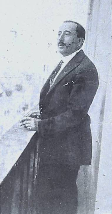 Adelardo Novo Brocas, fotografía en Vida Gallega 1921